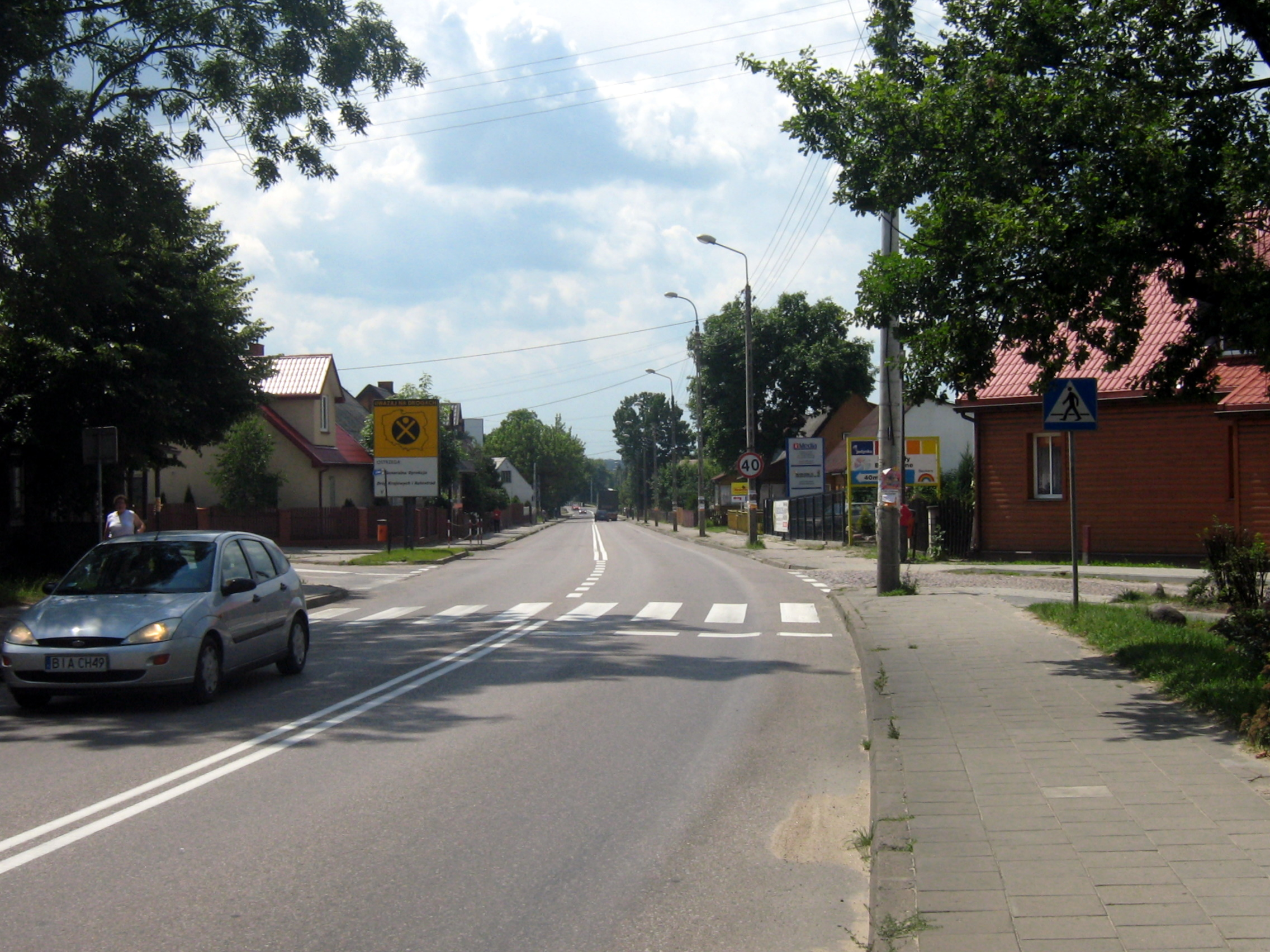 Droga krajowa nr 19 w Wasilkowie (kier. Białystok).